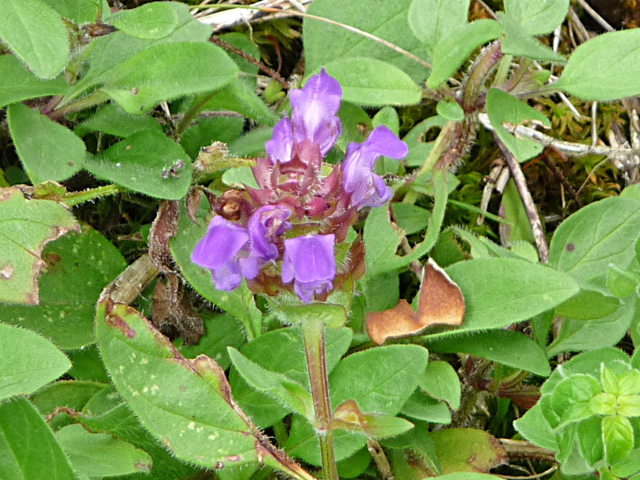 Großblütige Braunelle an der Leonhard-Paminger-Straße in Passau